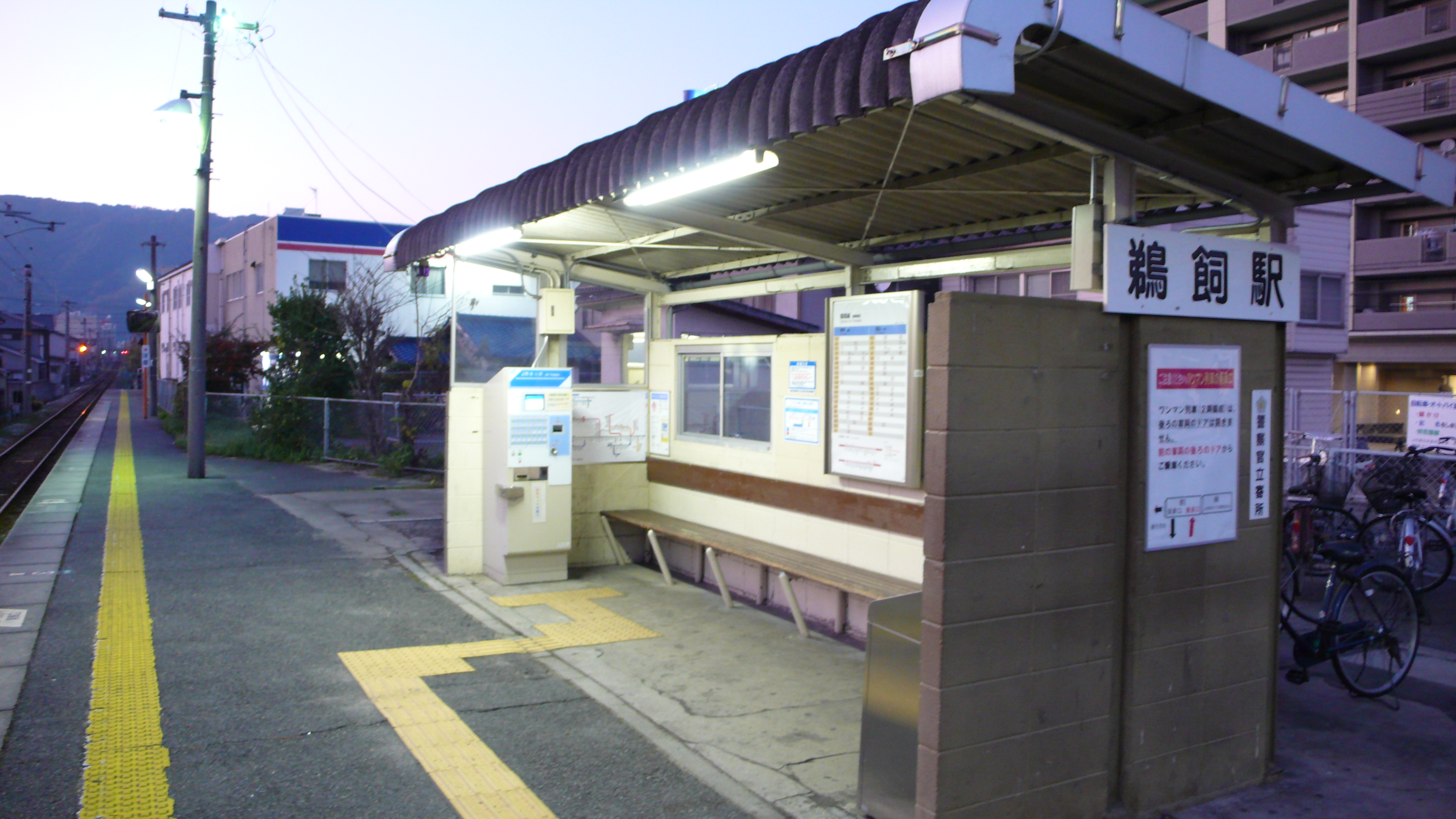 鵜飼駅